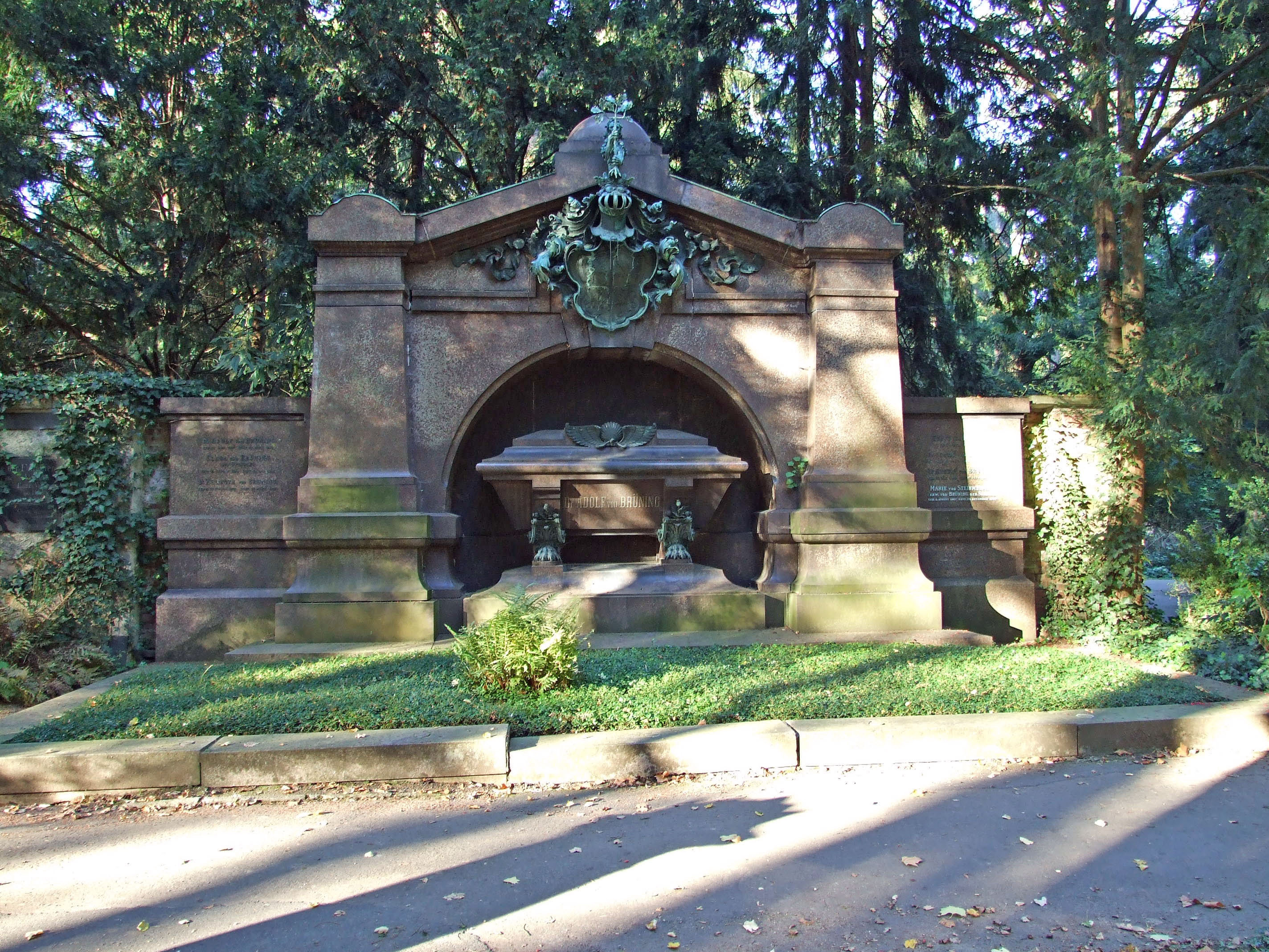 Adolf von Bruening Grabstelle auf dem Hauptfriedhof in Ffm